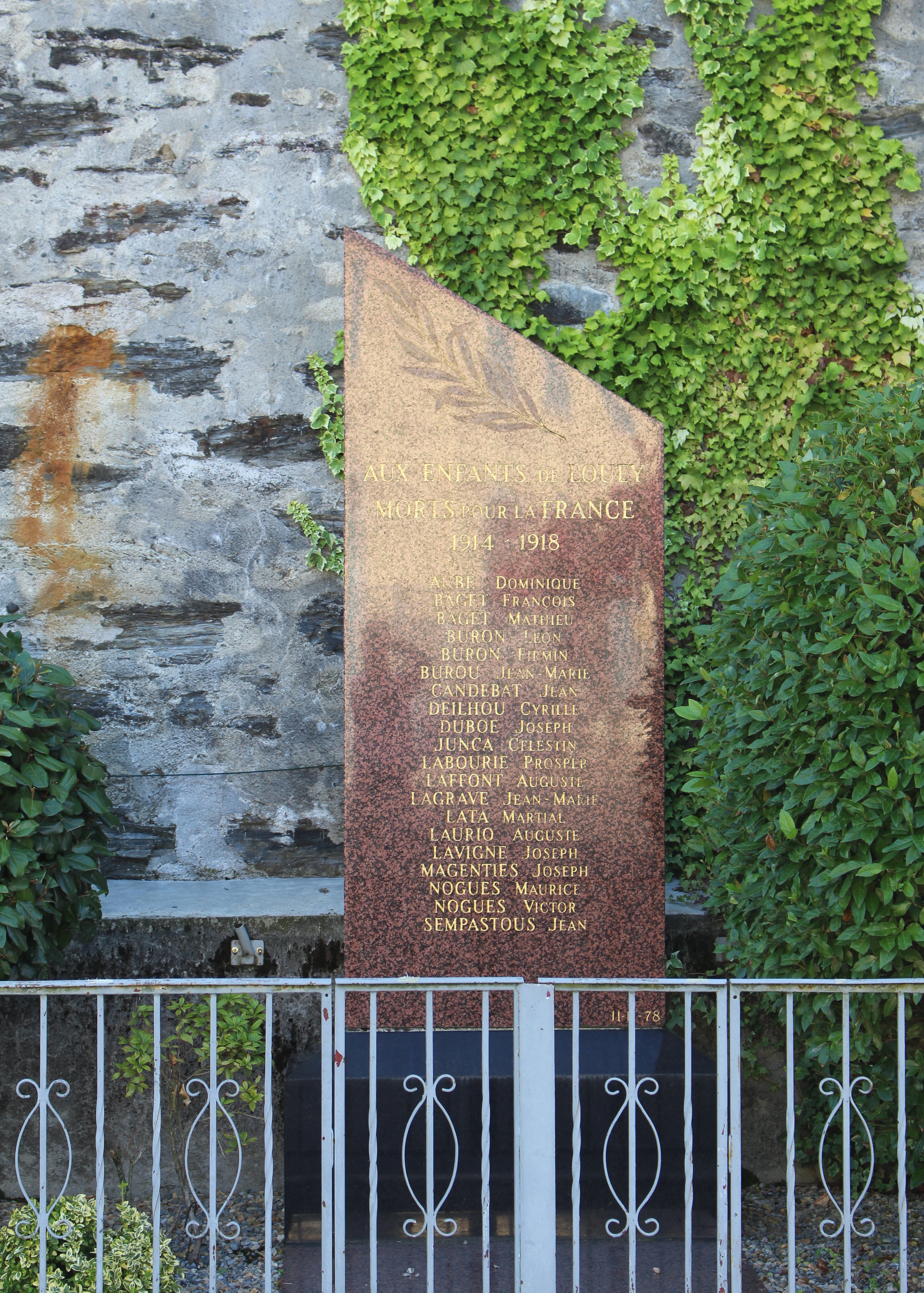 Monument aux morts de Louey (Hautes-Pyrénées)